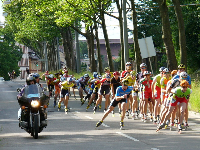 Stuttgarter Zeitungslauf Skater 2005-06-05